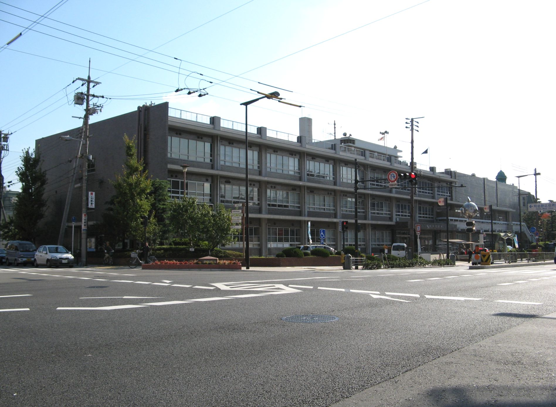 阿倍野区役所